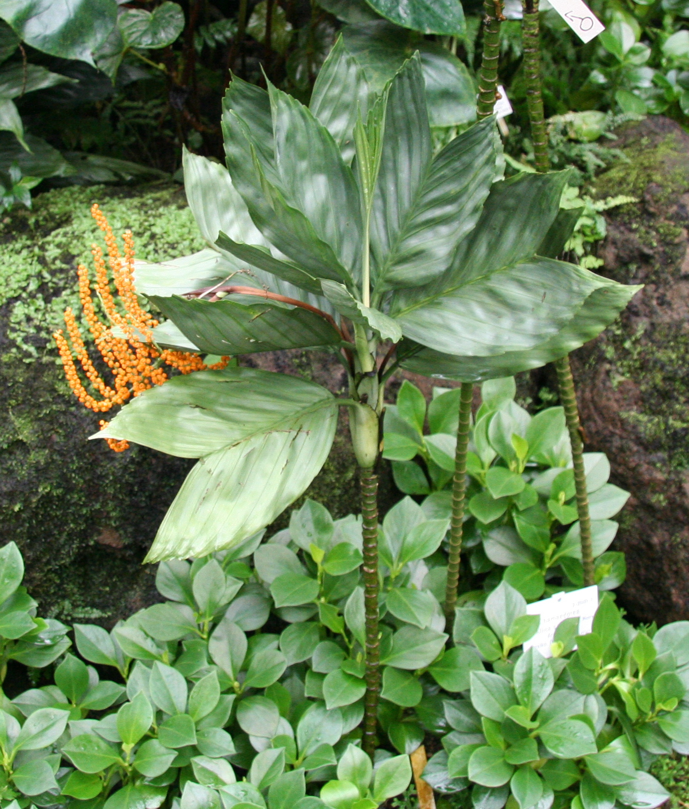 Chamaedorea metallica im Palmengarten Frankfurt/Main